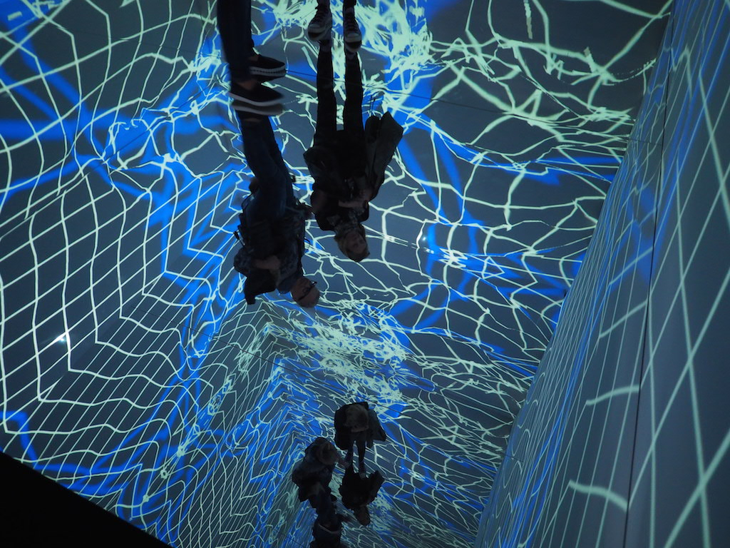 Die echzeit-generierte, audio-visuelle Installation ResonantSpace von Ben Lauber und Marcus Doering in den Øksnehallen in Copenhagen 2017 in der Ausstellung Perspective Playground.